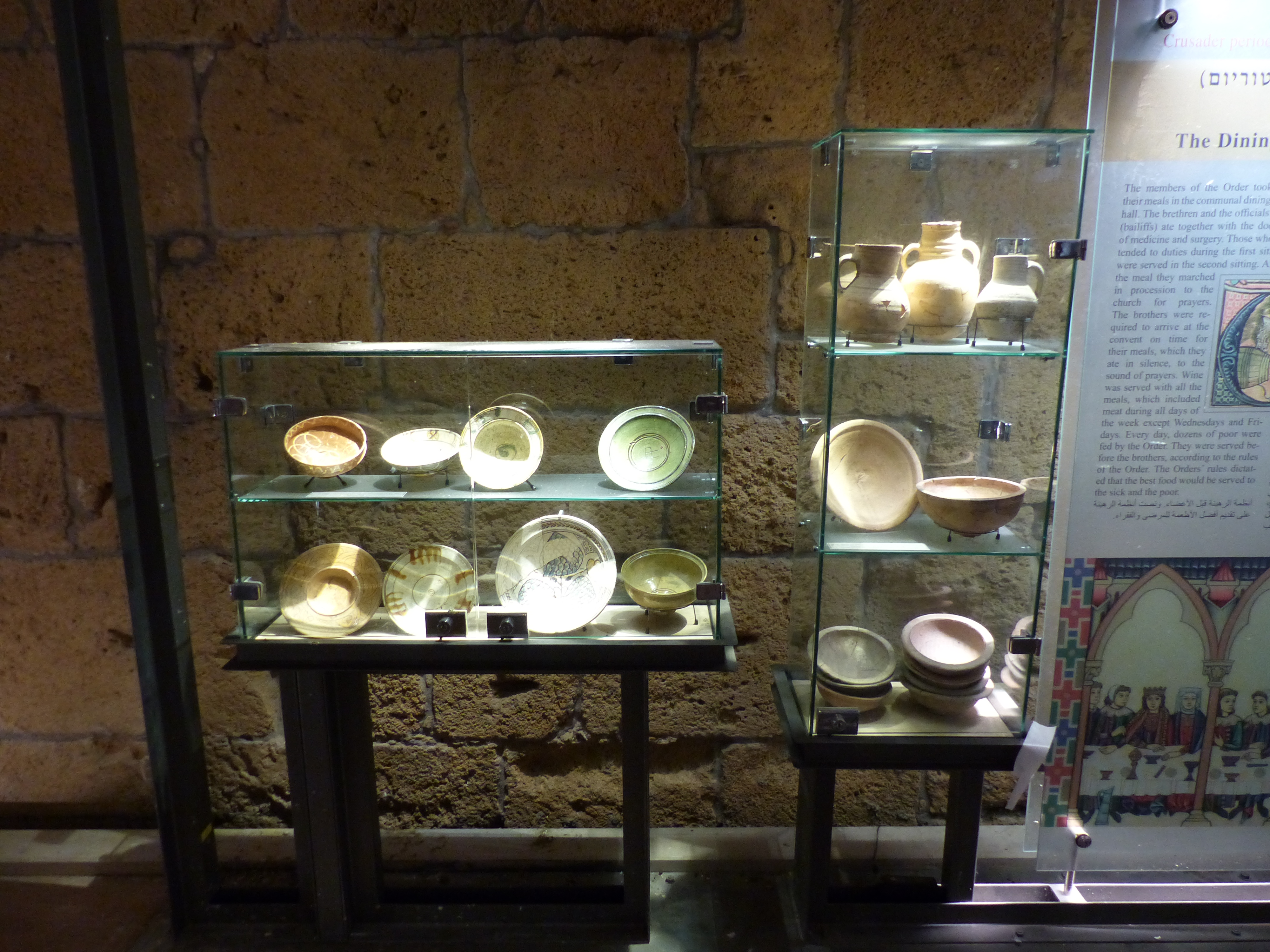 Castillo de Acre, Israel